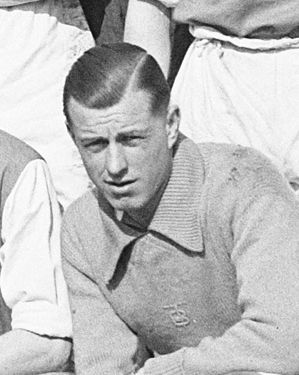 Theo Brokmann jr.